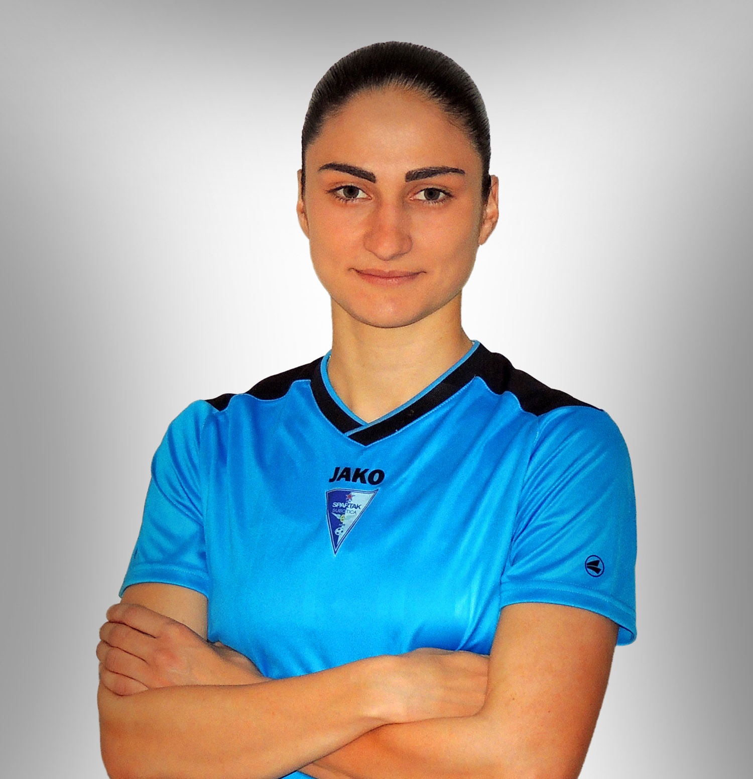 Аутор: Бојан Арсић Фотографија је уступљена на јавну употребу без икаквих ограничења